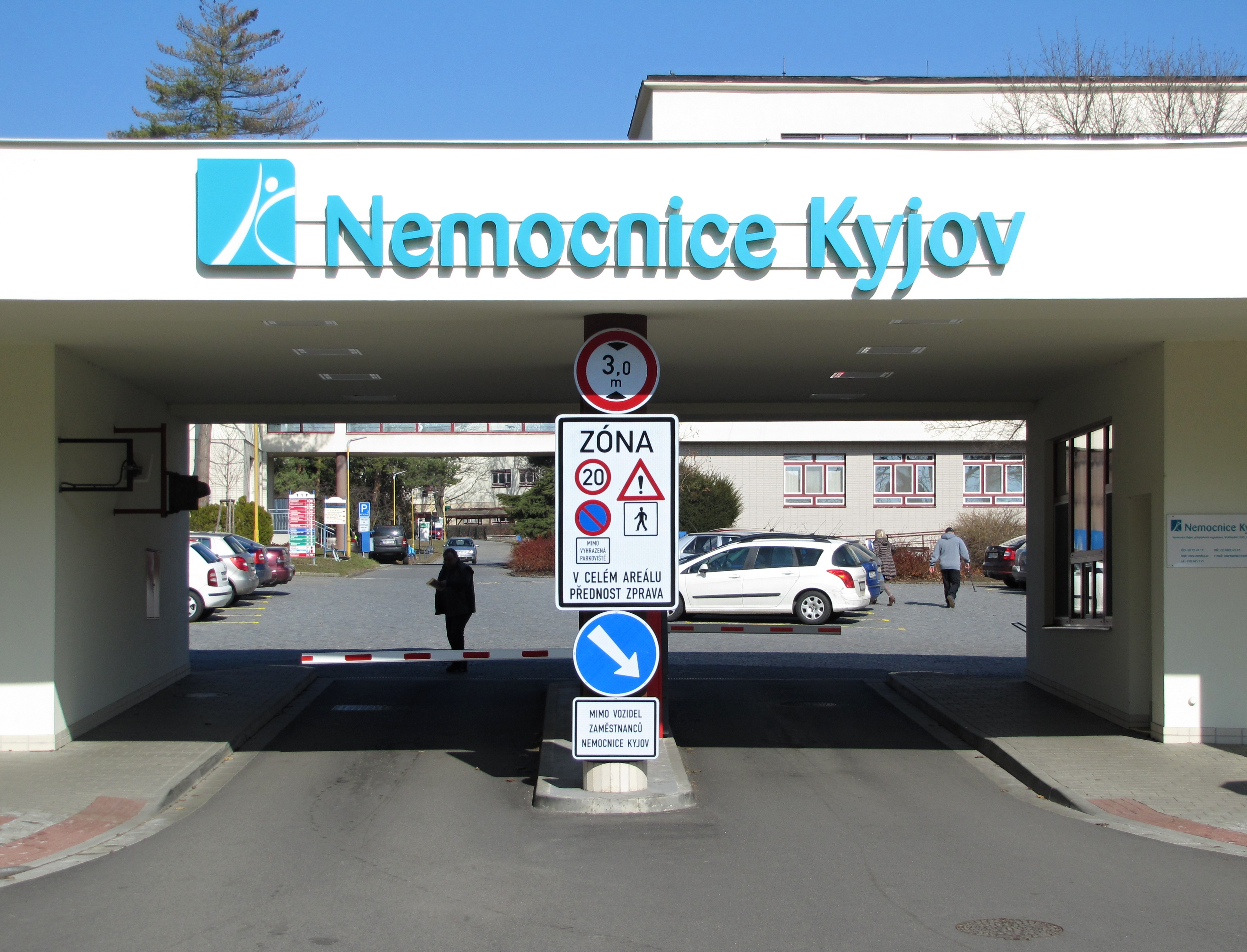 Nemocnice Kyjov, hlavní vjezd do areálu